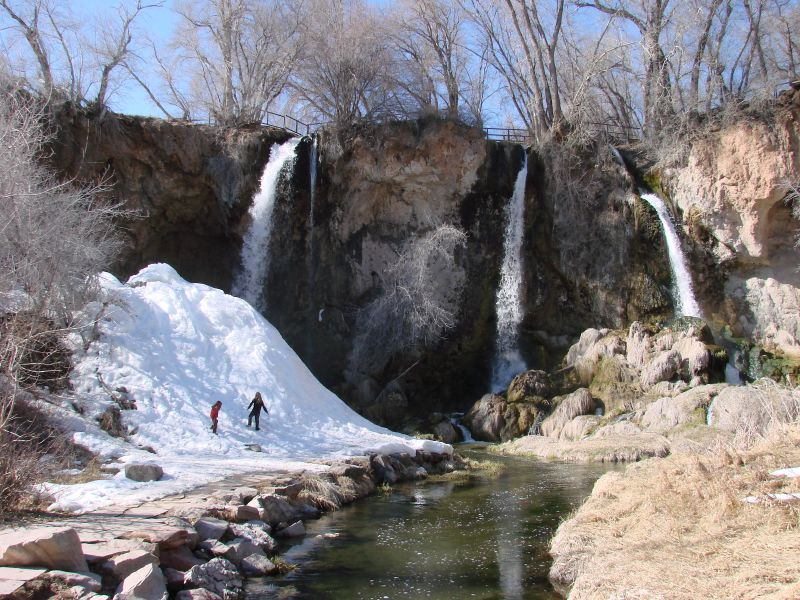 Rifle Falls State Park